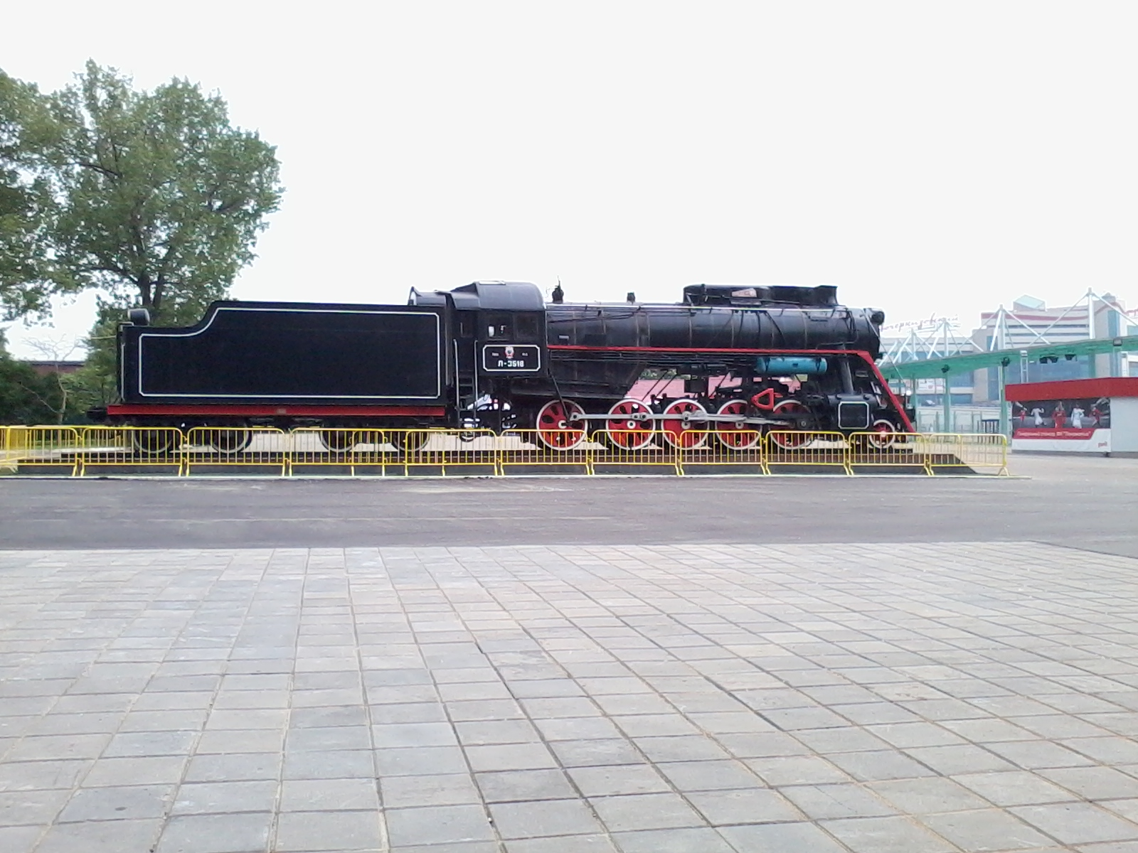 Паровоз Л-3516 возле главного входа во двор стадиона Локомотив.